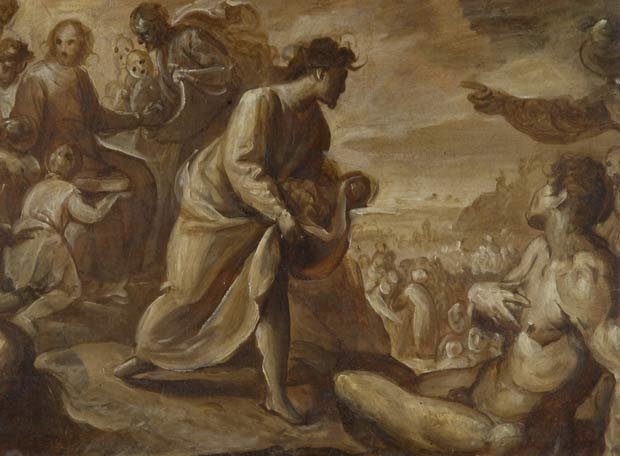 Multiplicación de los panes y los peces, dibujo